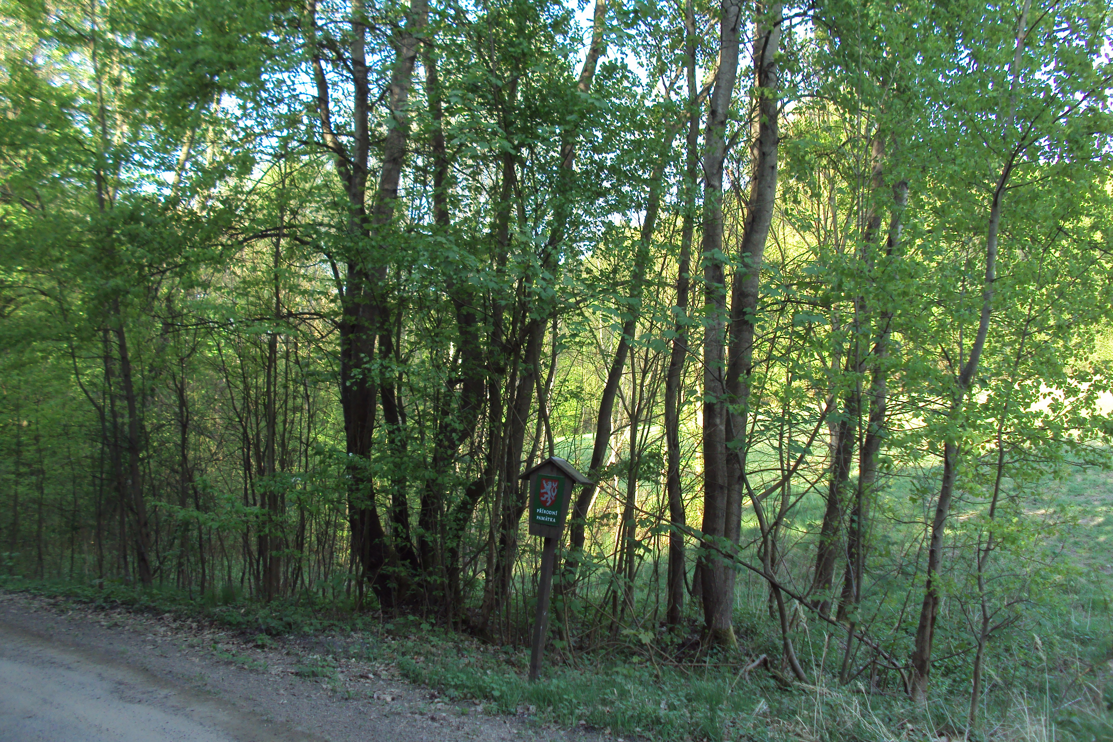 Přírodní památka je na katastru obce Zakšín, fotka od Osinalického sedla